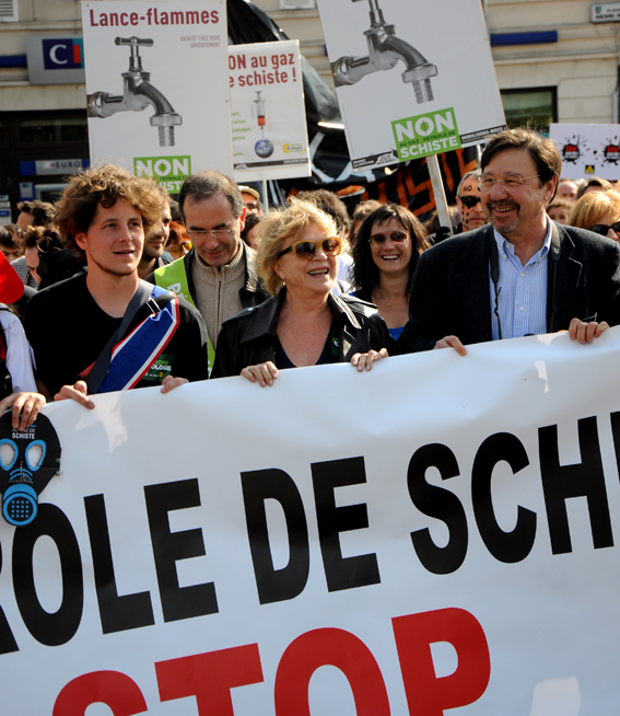 Eva Joly